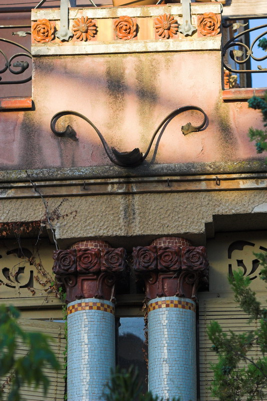 Casa Juli Barber i Poinsard (la Garriga-Vallès Oriental-Catalunya), obra de Joaquim Raspall 1910. Detalls balcó façana oest.